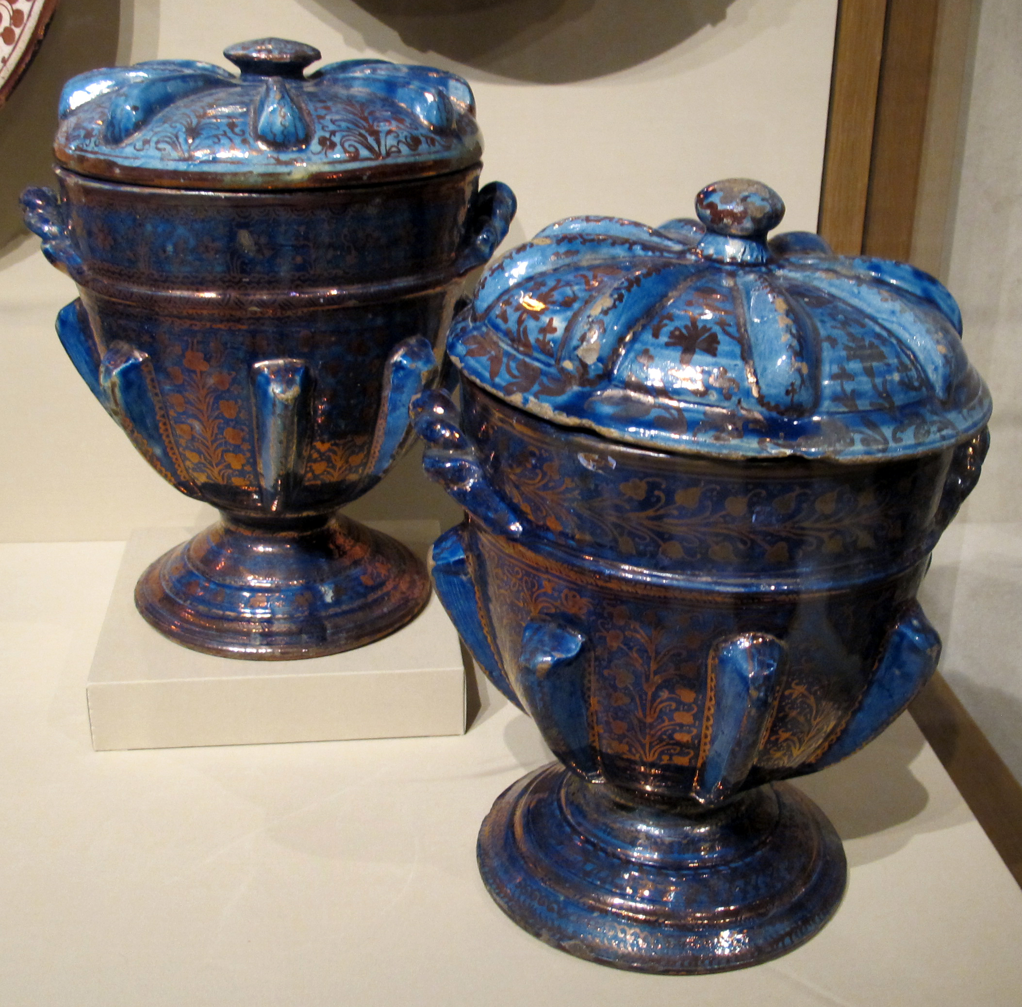 Maiolica nel Metropolitan Museum of Art